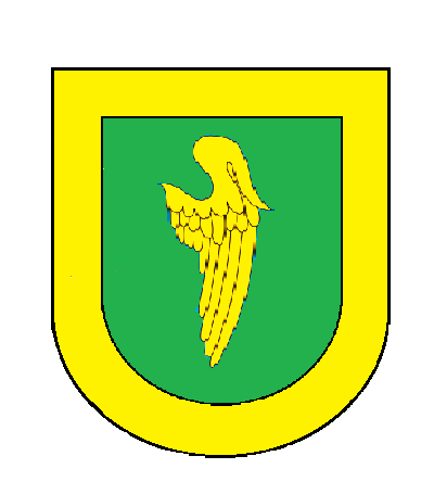 Escut antic del municipi d'Altron (Sort, Pallars Sobirà)